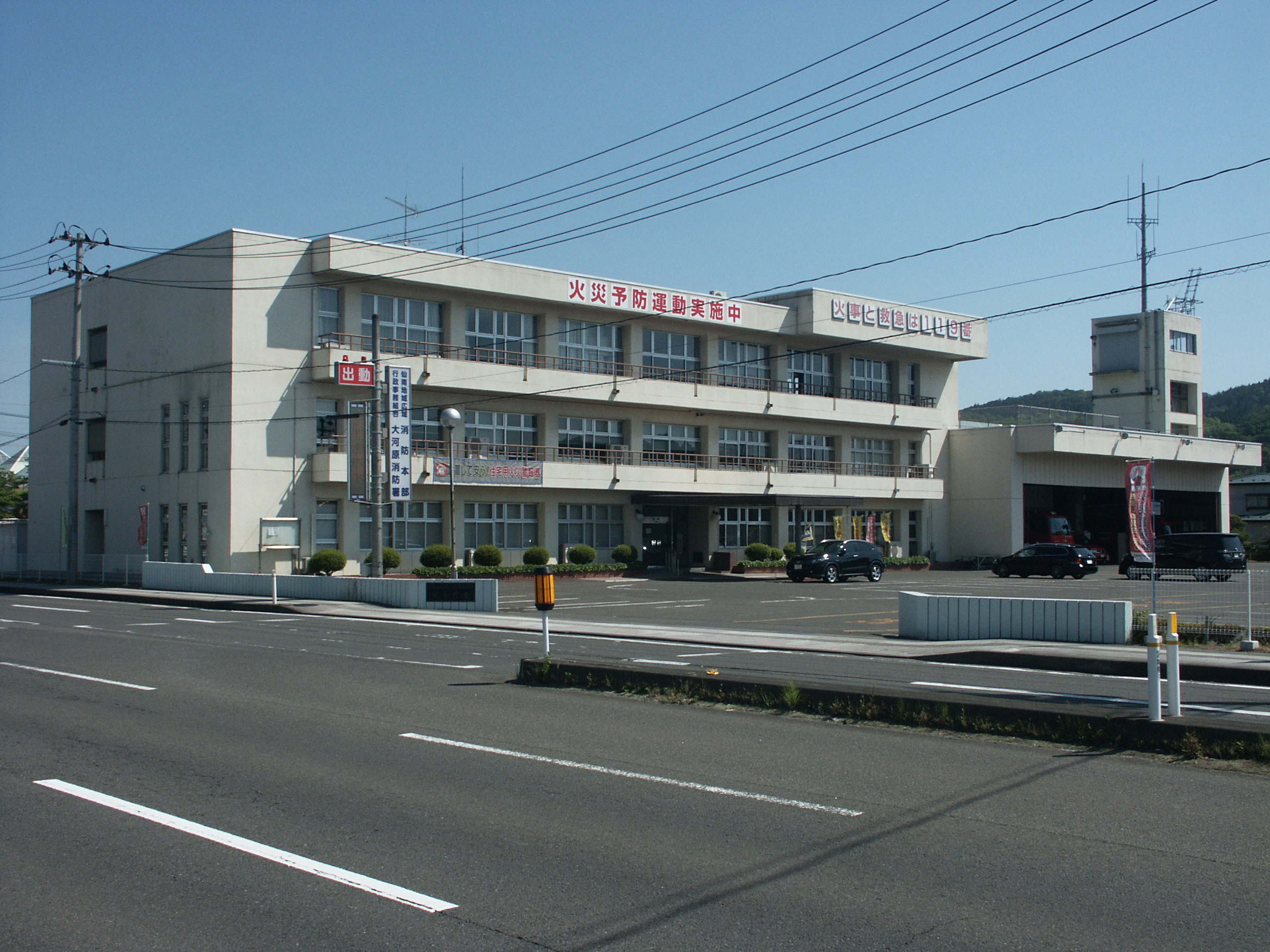 仙南地域広域行政事務組合消防本部大河原消防署庁舎